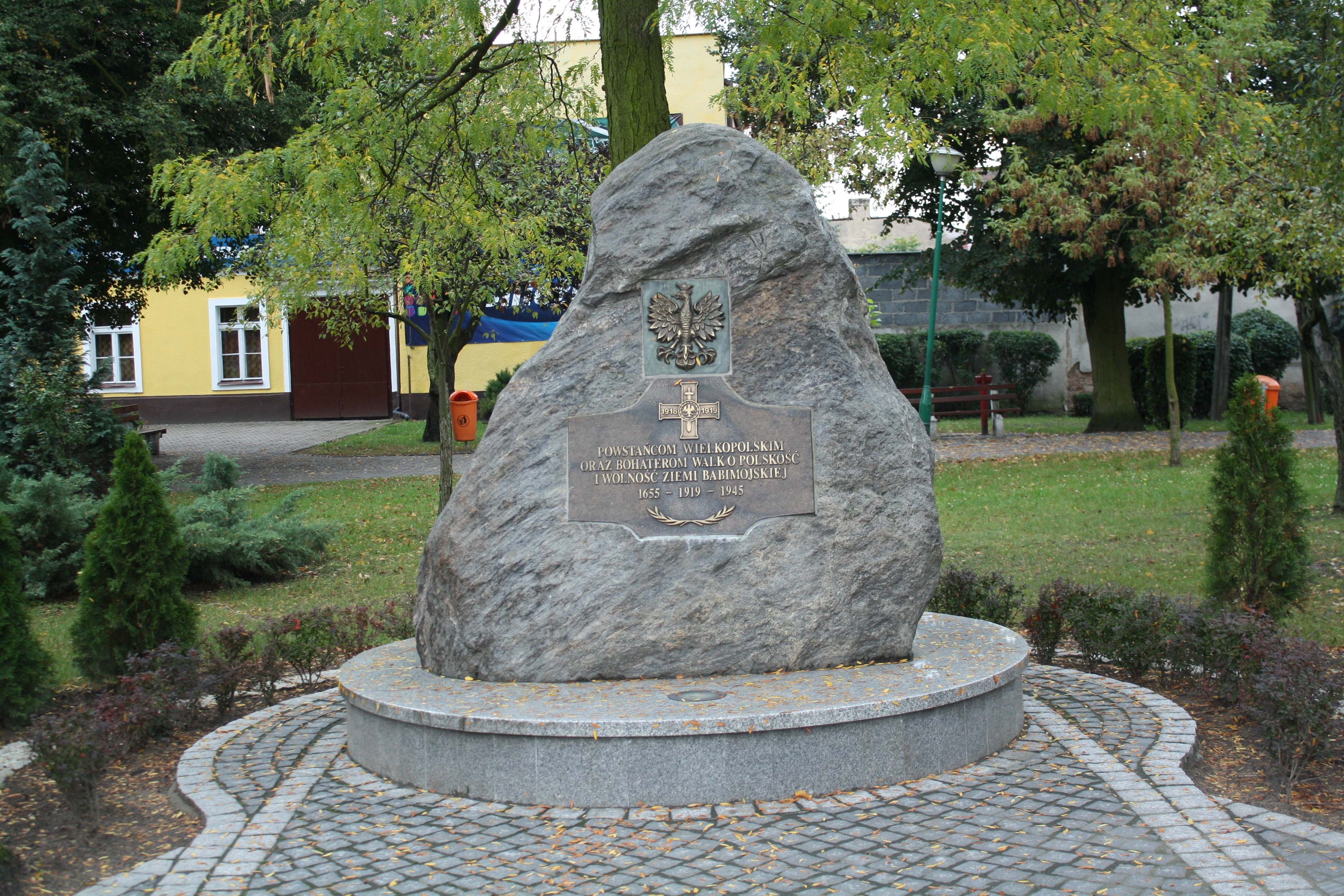 Obelisk w Parku w Babimoście